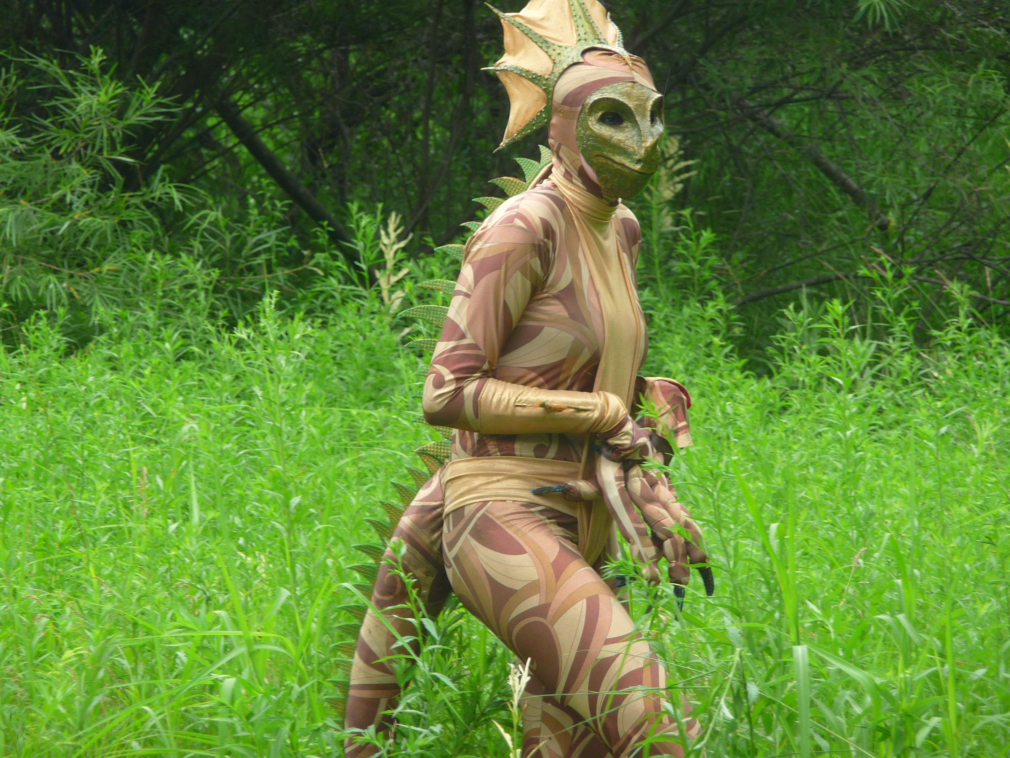 Участница ролевой игры, район Раздольного (Приморский край), 2011-07-06